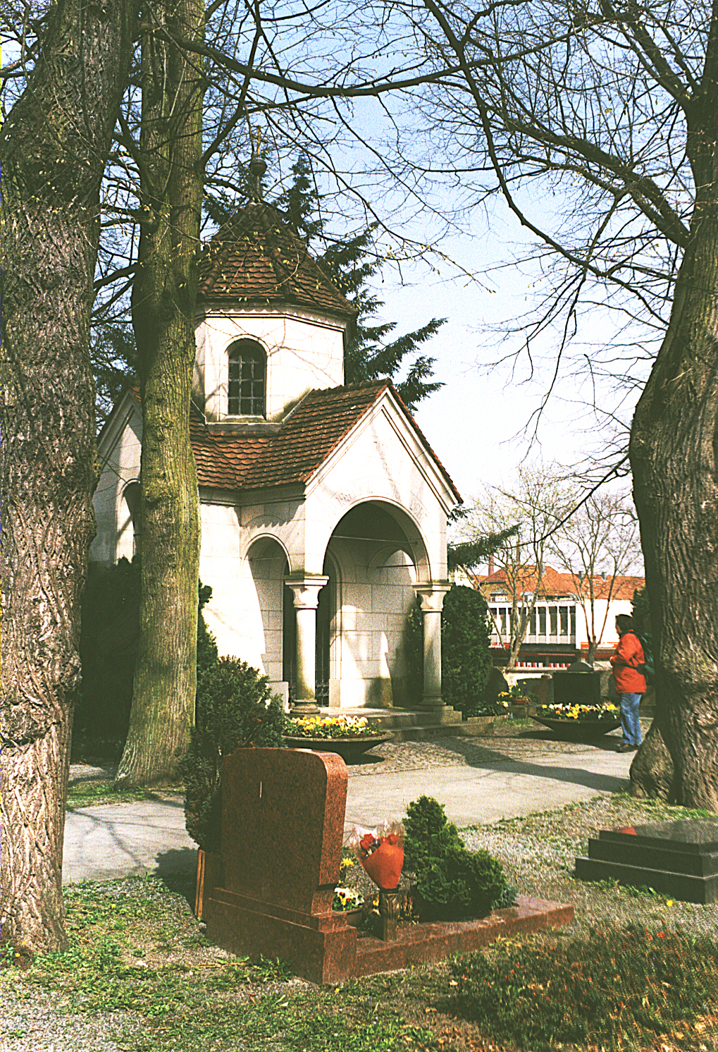 Mausoleum in Bayreuth.